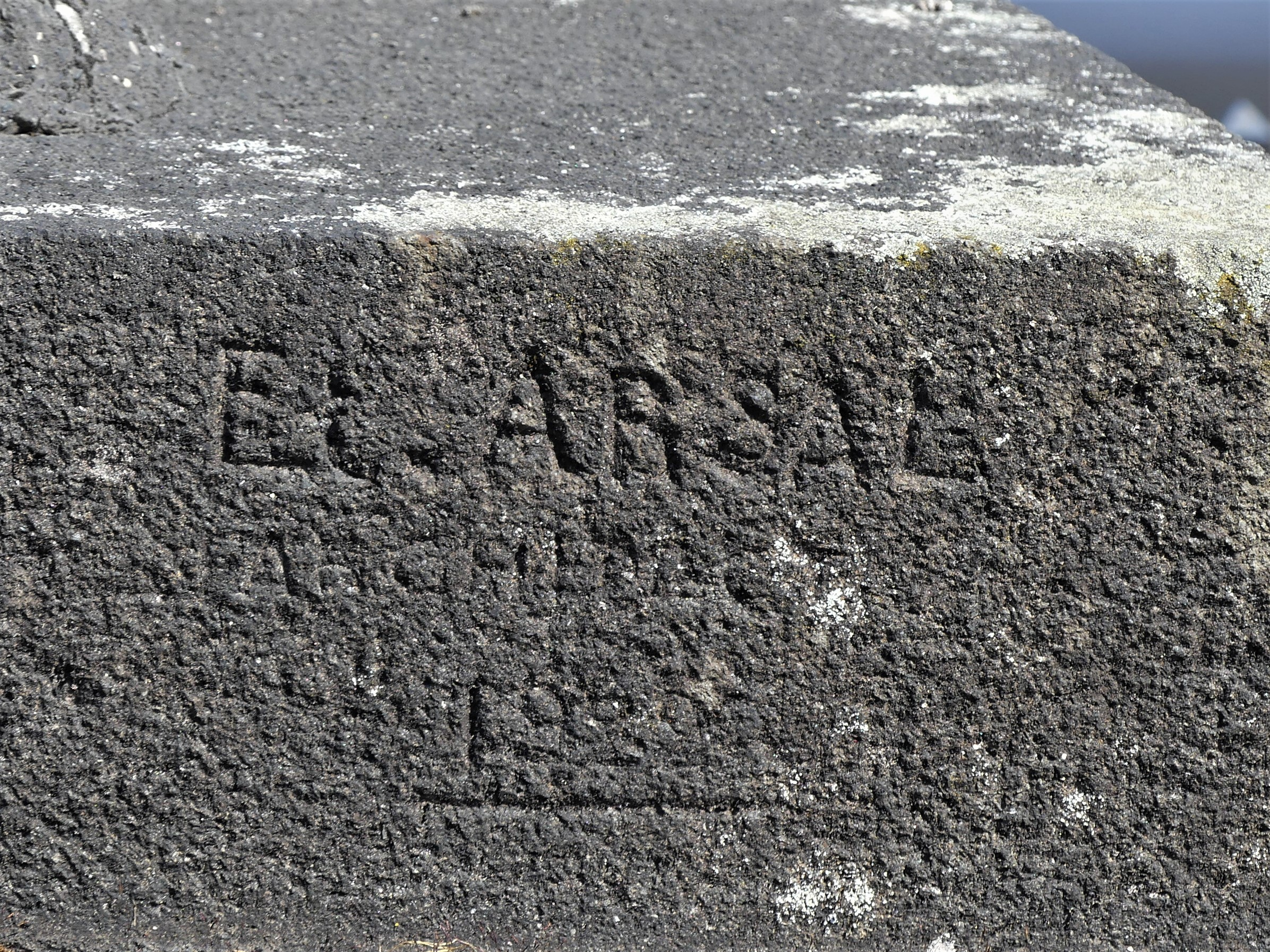 Signature du sculpteur sur le monument aux morts d'Espalion, Aveyron, France.